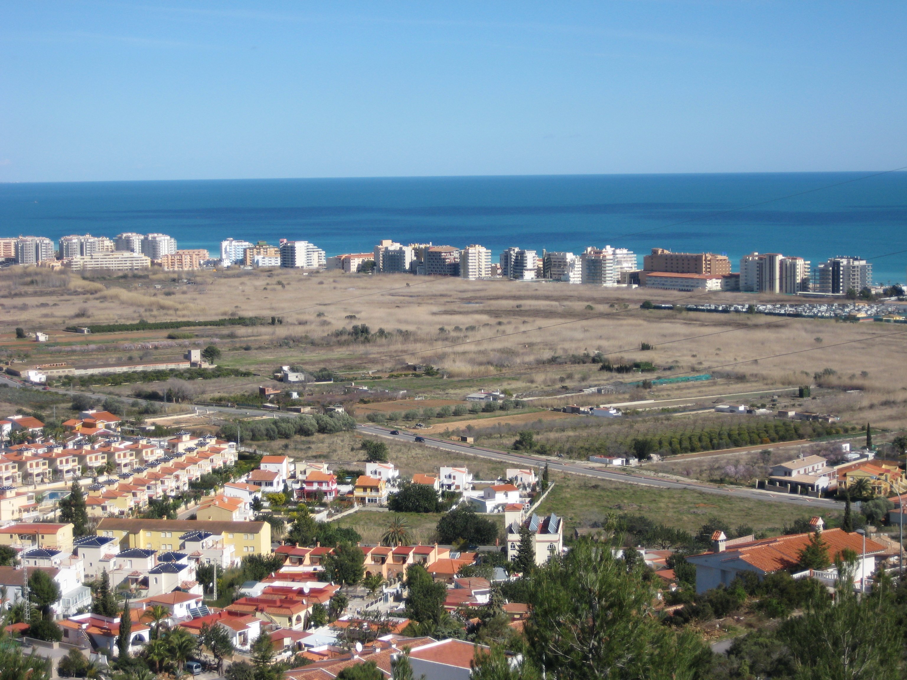 Vista general del centre de la marjal de Peníscola (Baix Maestrat, País Valencià)